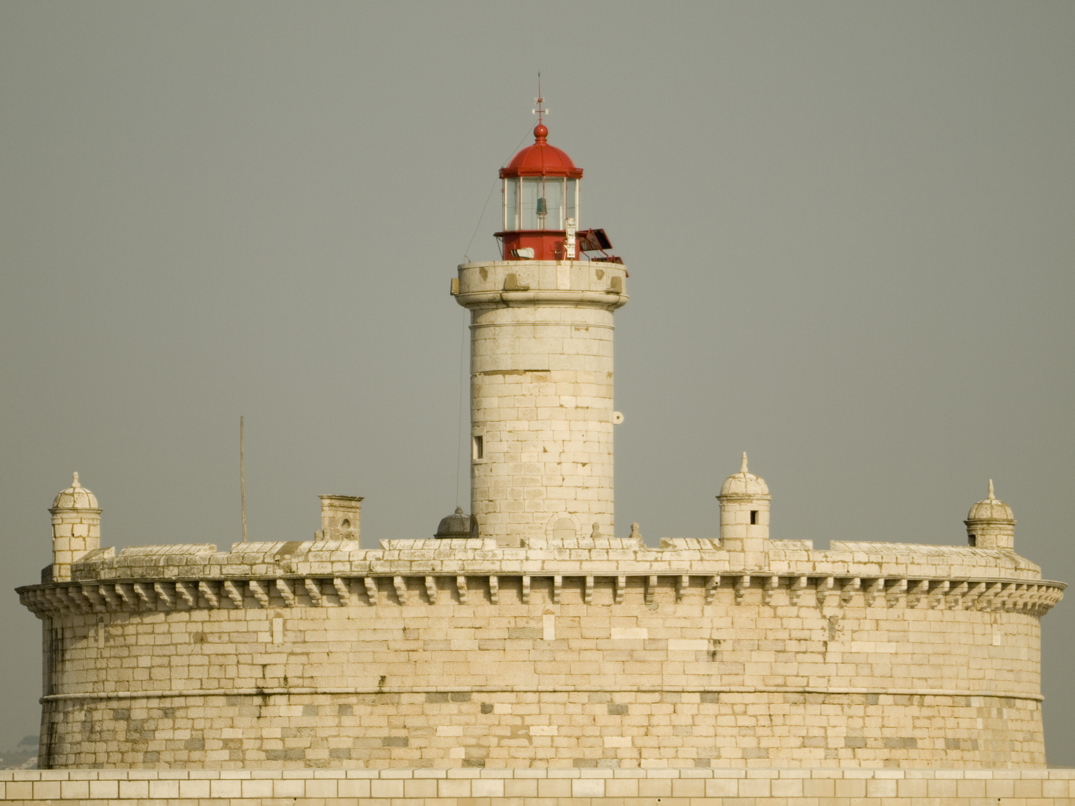 À VOLTA DO BUGIO